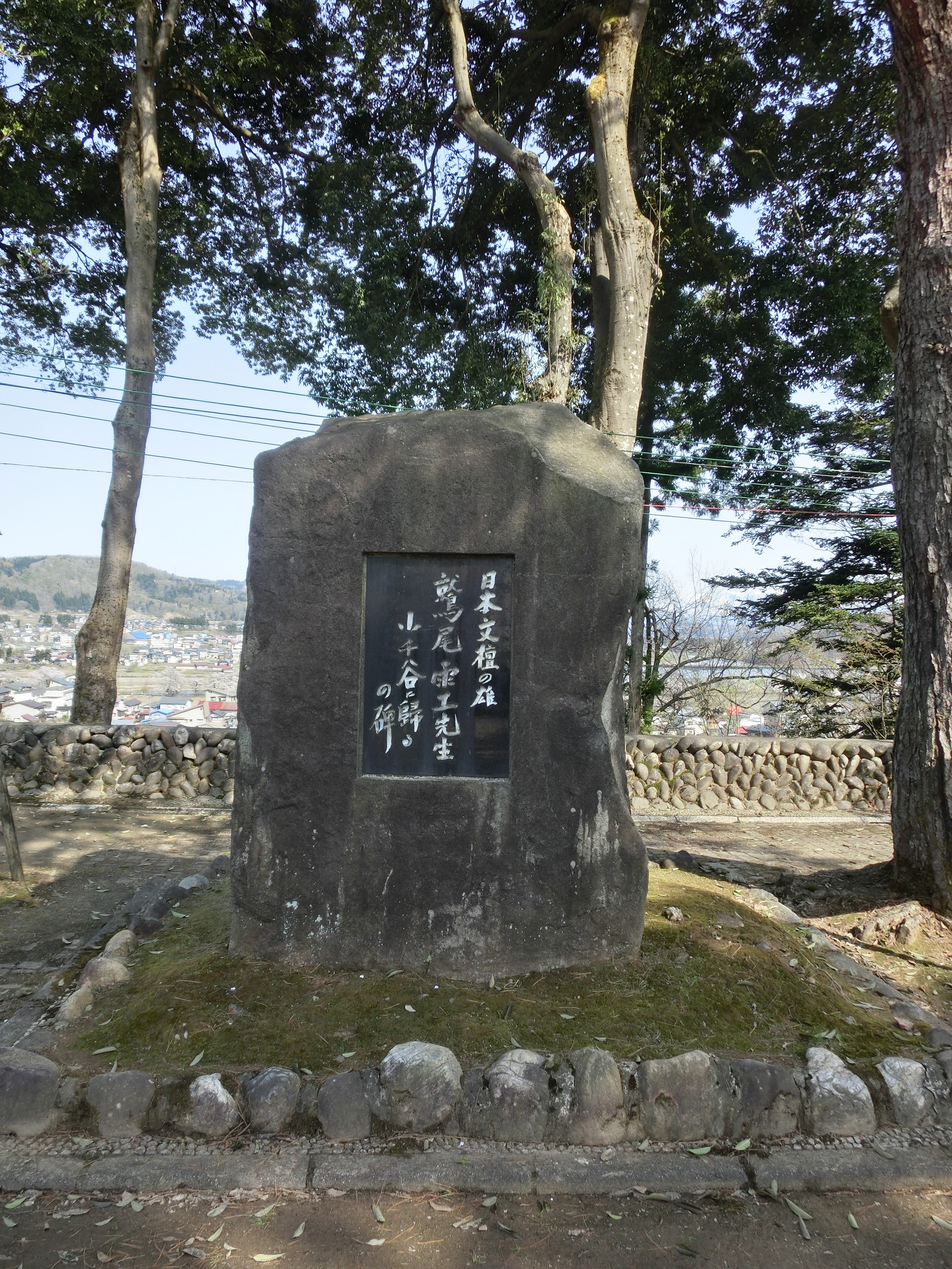 この画像は2018年4月19日投稿者自身によって新潟県小千谷市船岡山の船岡公園内にて撮影された「日本文壇の雄 鷲尾雨工先生 小千谷に帰るの碑」の写真。